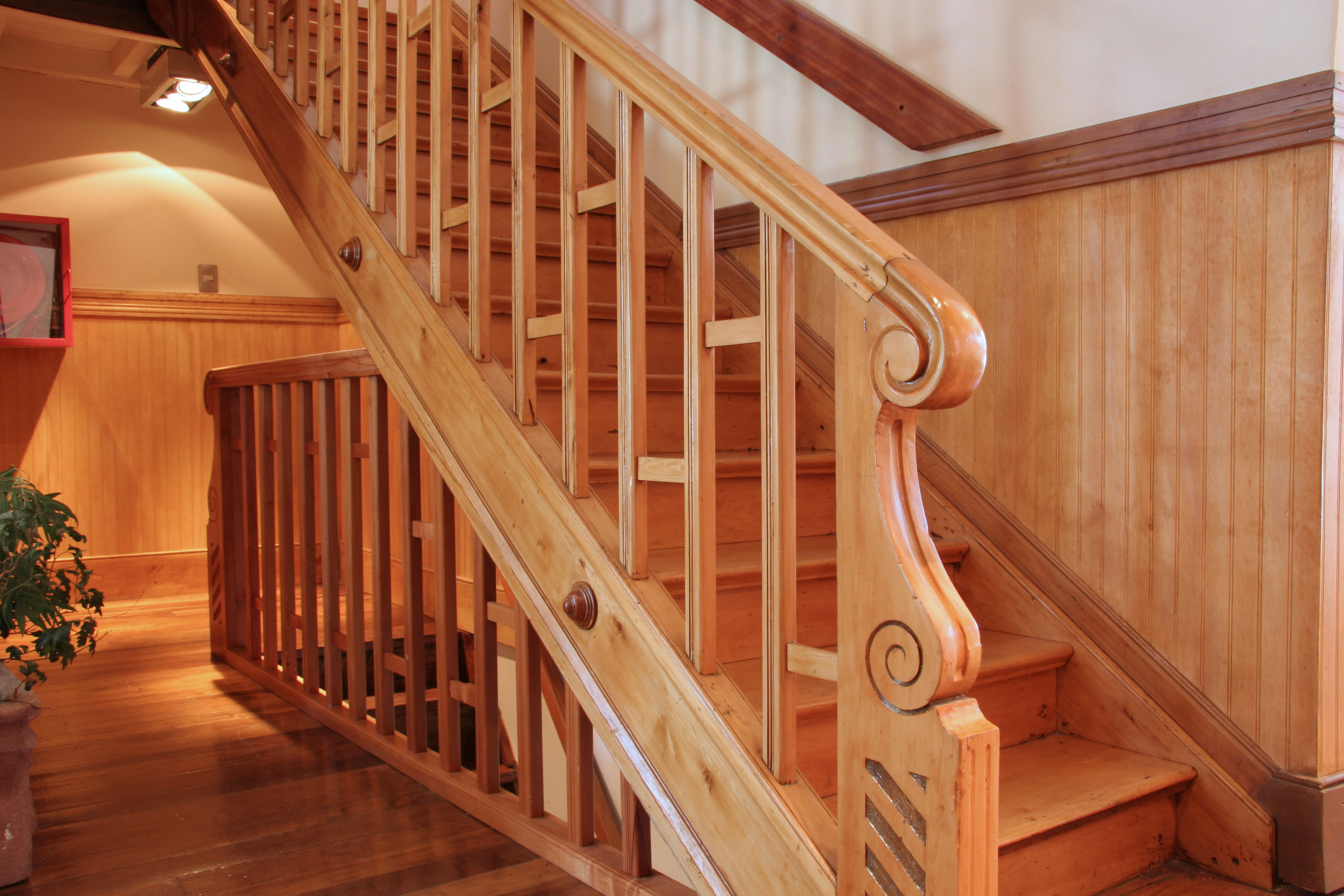 Casona Calle General Lagos, Valdivia